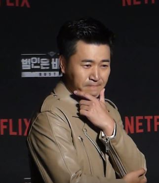 30일 오후 서울시 강남구 인터콘티넨탈 코엑스에서 NETFLIX 최초의 한국 예능 '범인은 바로 너' 제작발표회가 열렸다. 이날 안재욱, 유재석, 박민영, 김종민, 이광수, EXO 세훈, 구구단 세정이 참석하여 기자 간담회도 열렸다.